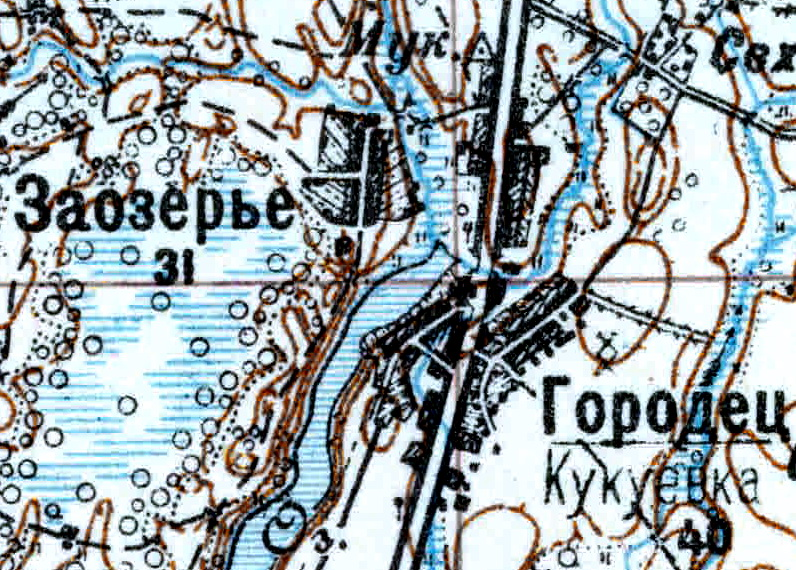 Топографическая карта Ленинградской области, квадрат VIc-28 (Луга), Заозерье